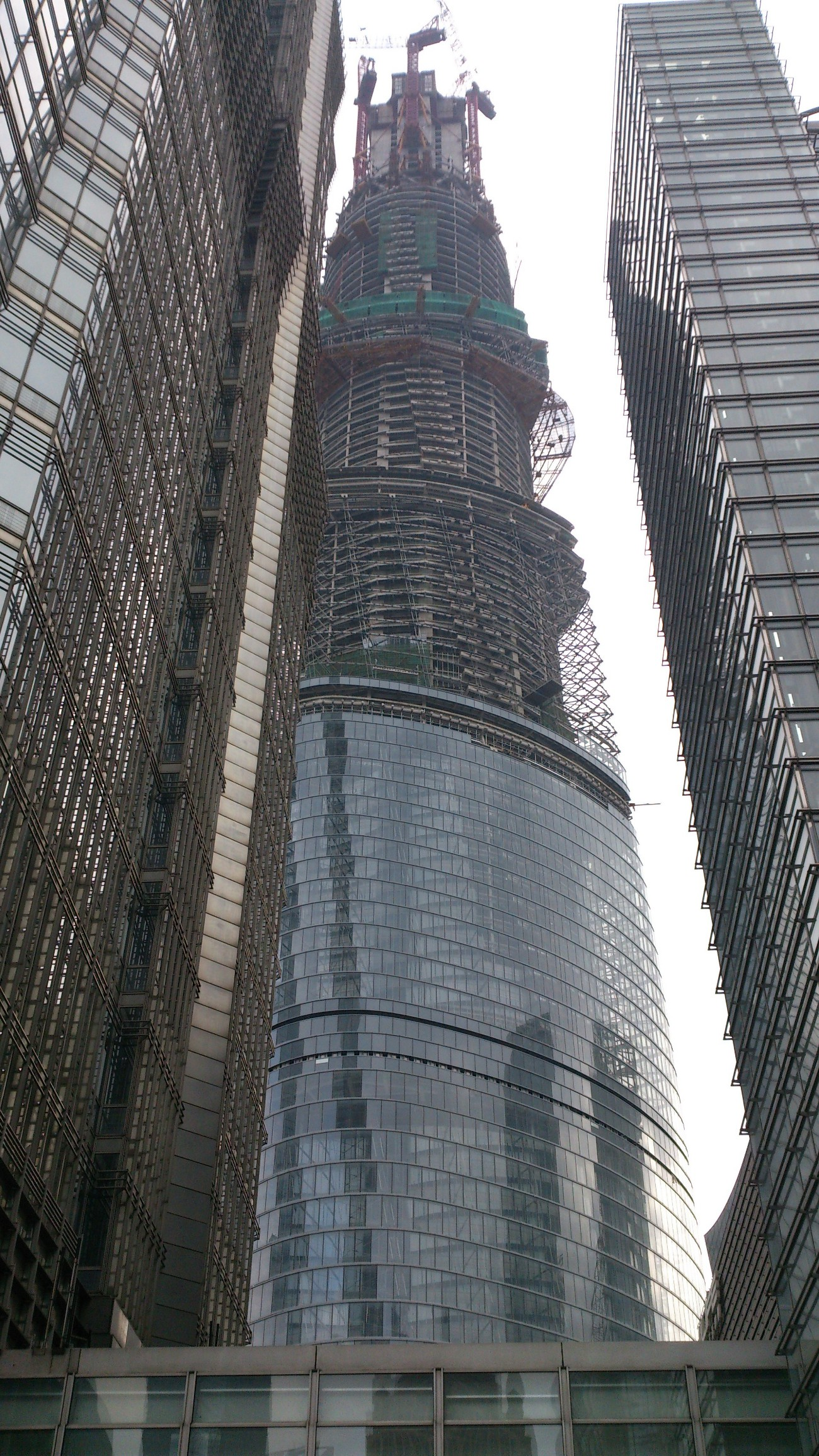 La Shanghai Tower en construction (mars 2013).